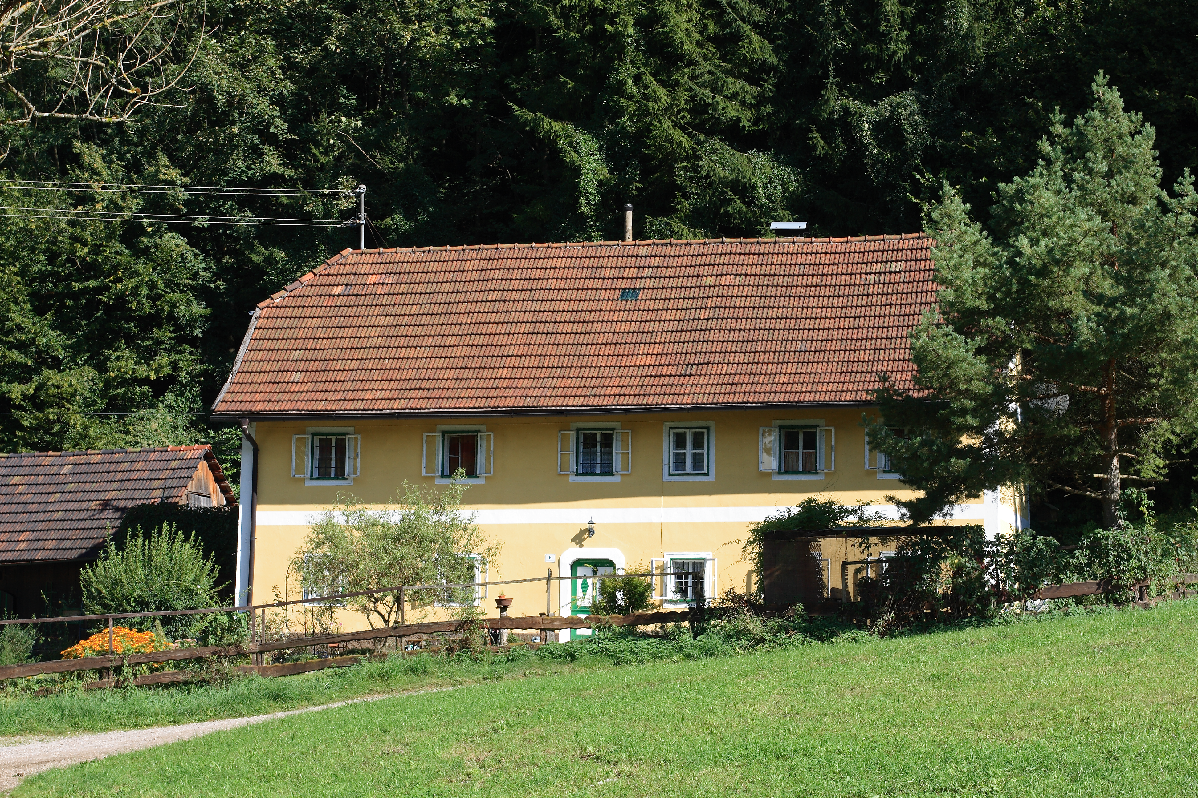 Das Gärtnerhäusl im Freilichtmuseum Schmiedleithen